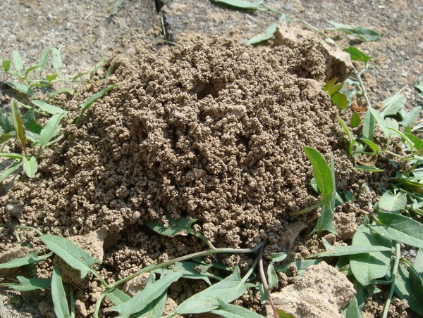 Eingang zum Stock der Sandbiene